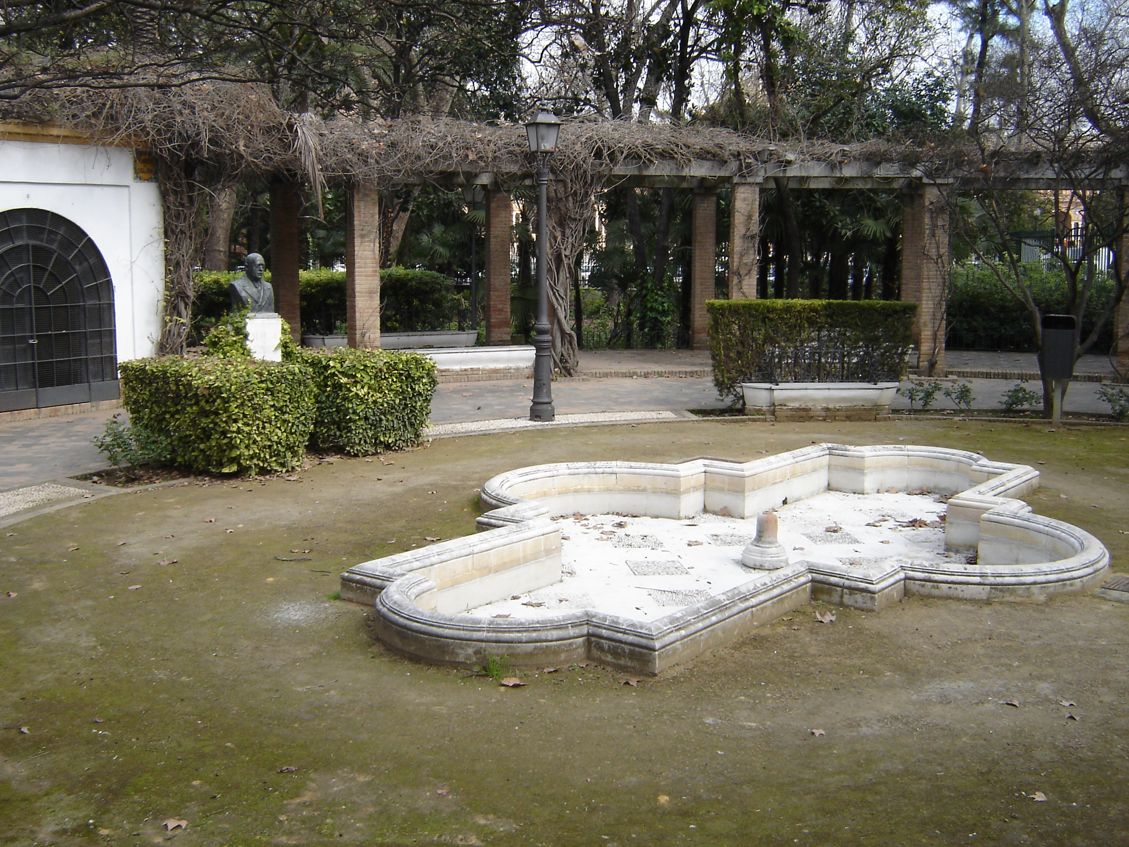 Glorieta de Luca de Tena, en el Parque de María Luisa (Sevilla). Realización propia.